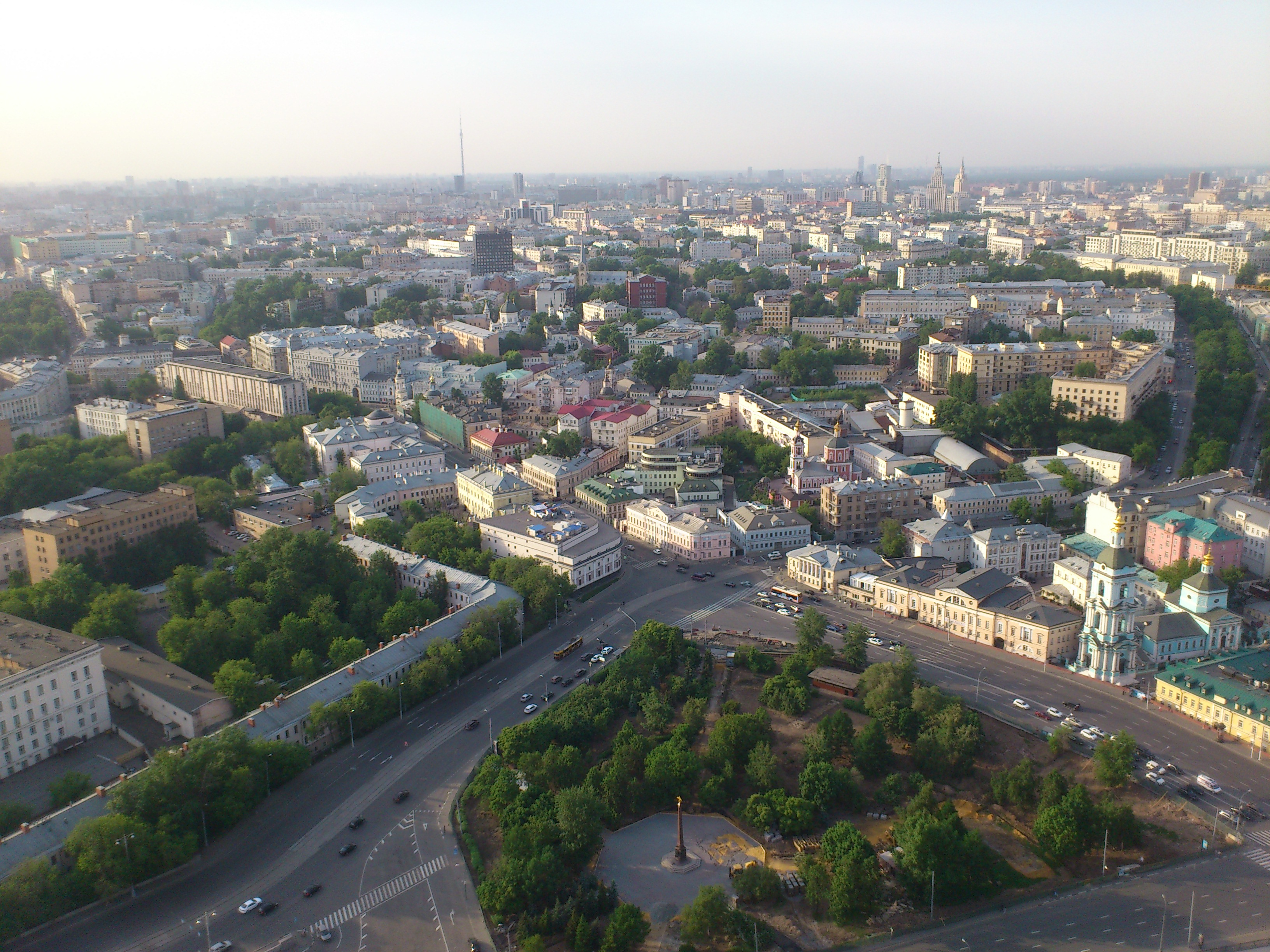 с шпиля высотки на котельнической набережной